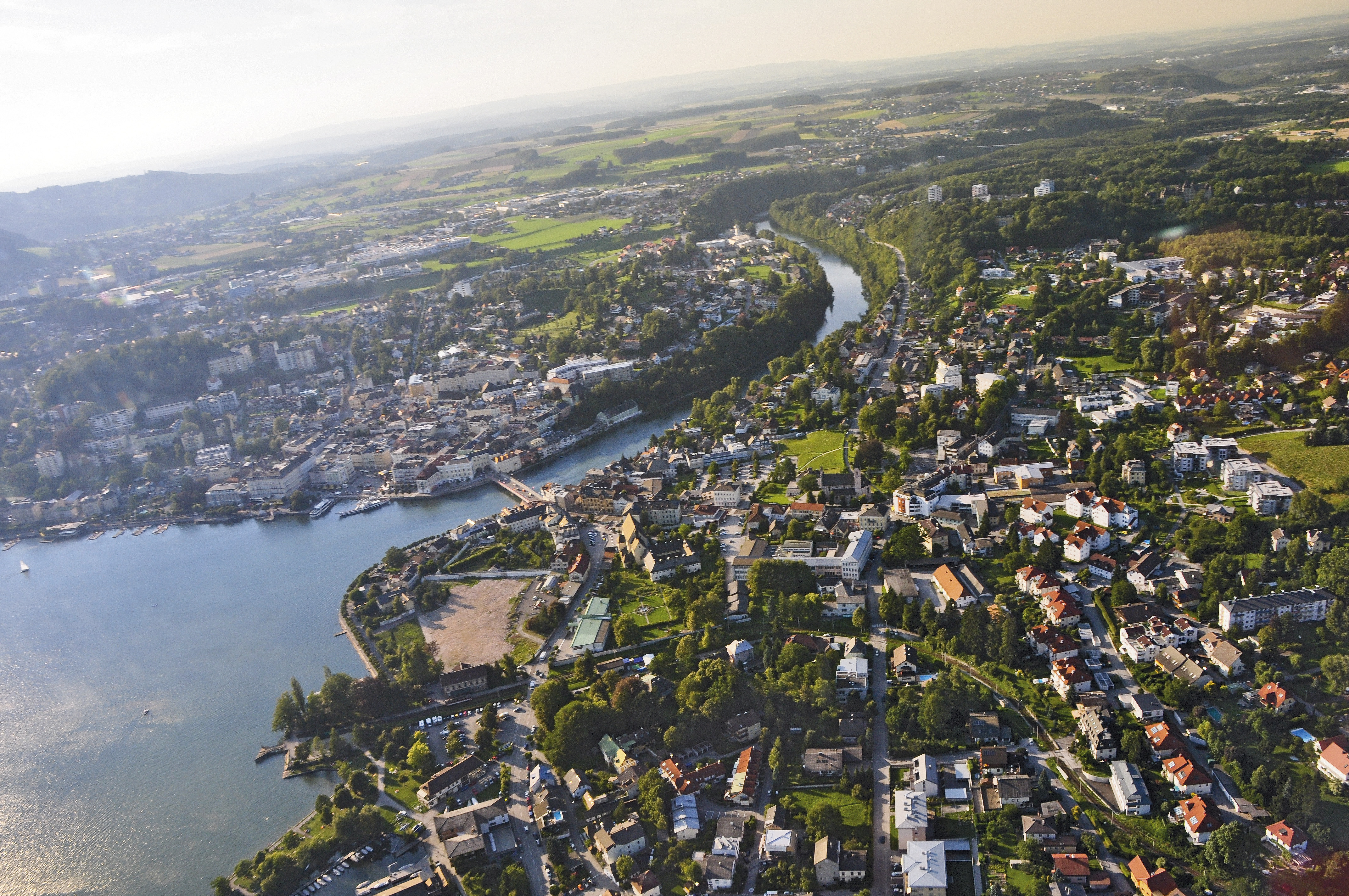 Gmunden aus der Vogelperspektive